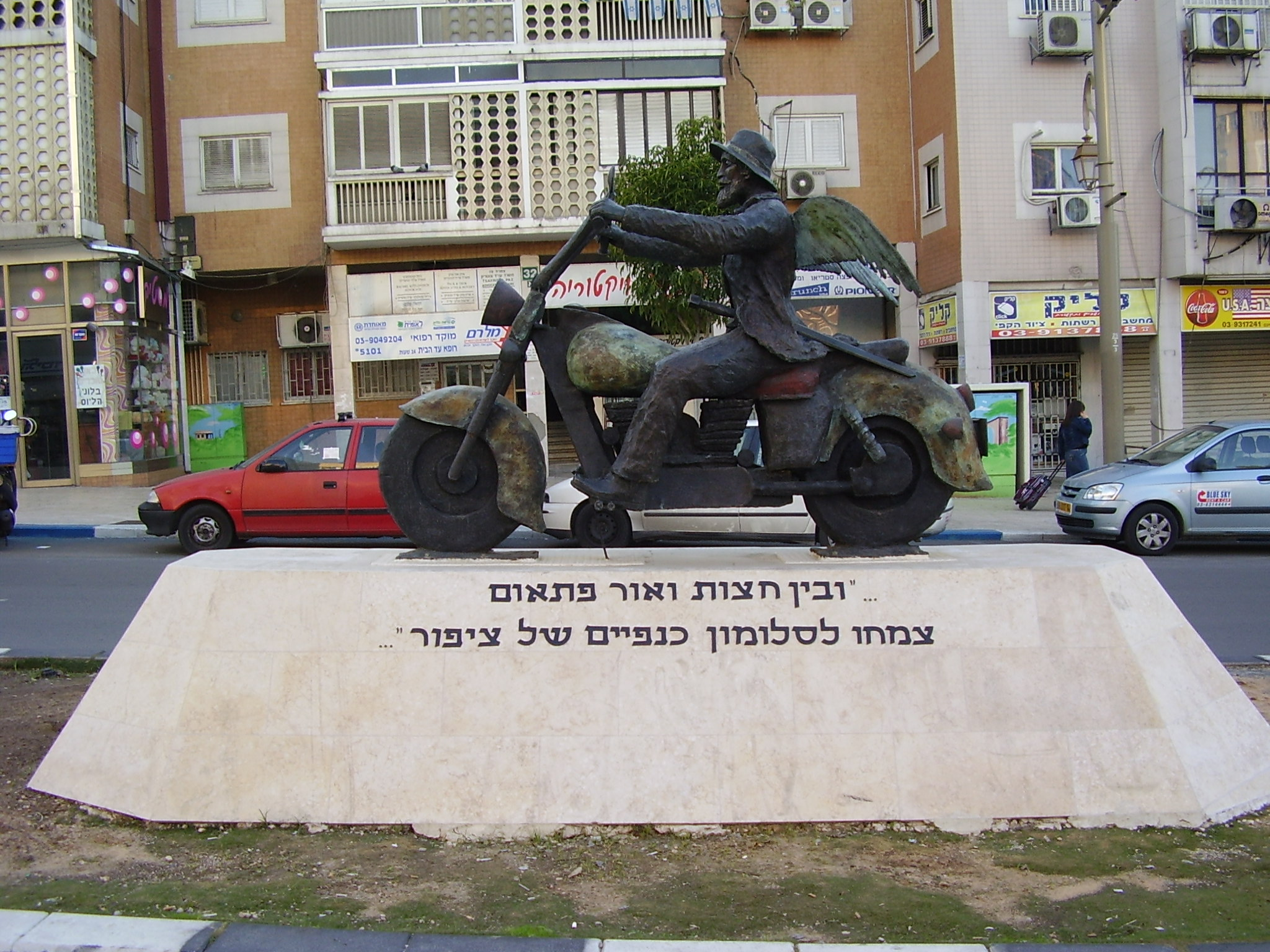 יואל משה סלומון עם כנפיים - פסל במרכז פתח תקוה, ברחוב חיים עוזר. הפסל שואב השראה מהבלדה על יואל משה סלומון שמשם לקוח המשפט המצוטט בתחתית הפסל. הפסל, רמי גולשני, כתב על הפסל באתר מועדון האופנועים הישראלי: "לאחרונה מבחינתי, הגשמתי חלום נוסף. עשיתי לעיריית פ"ת פסל ברונזה גדול של מייסד פ"ת - יואל משה סלומון על אופנוע הארלי, פסל גדול שמוצב במרכז העיר פ"ת ומסב לי כבוד רב. ובכך שילבתי שני תחביבים חשובים בחיי." רישיון נוצר על ידי משתמש:Avi1111